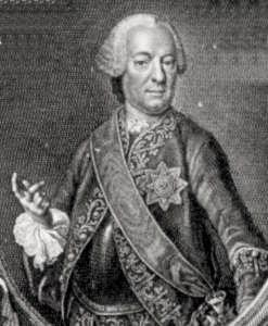 Philipp Andreas Graf von Ellrodt (vormals Freiherr von Ellrodt, auch „Graf Ellrodt von Reipolzkirchen“, auf (Neu-)Drossenfeld, Reipoltskirchen, Lausnitz, Neunhofen; Premierminister des Markgrafentums Bayreuth (* 4. August 1707, + 1. Januar 1767)